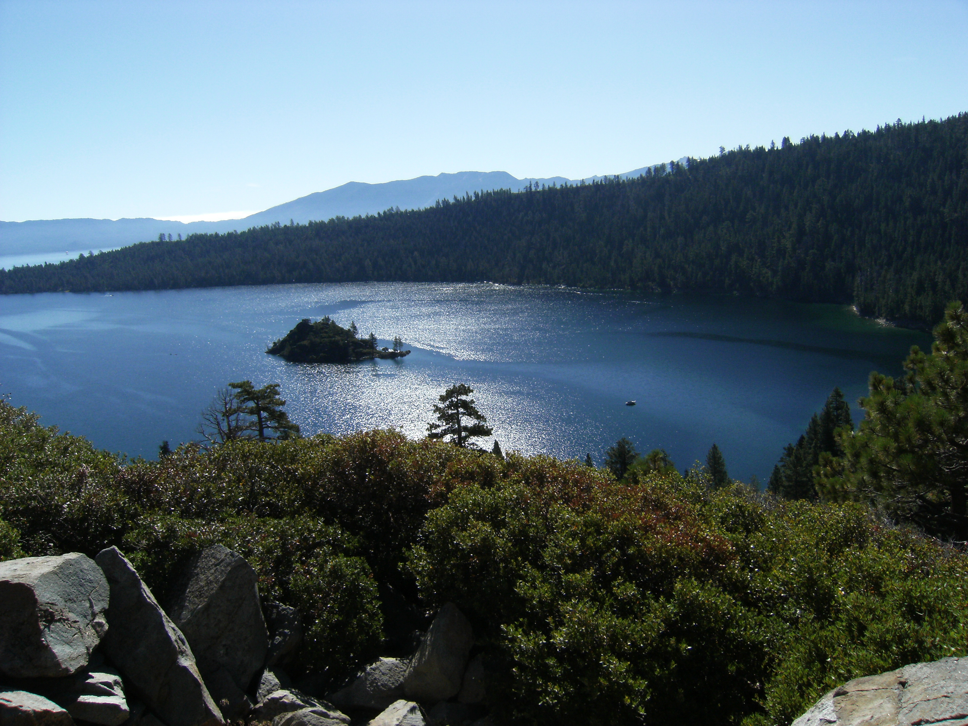 Lake Tahoe